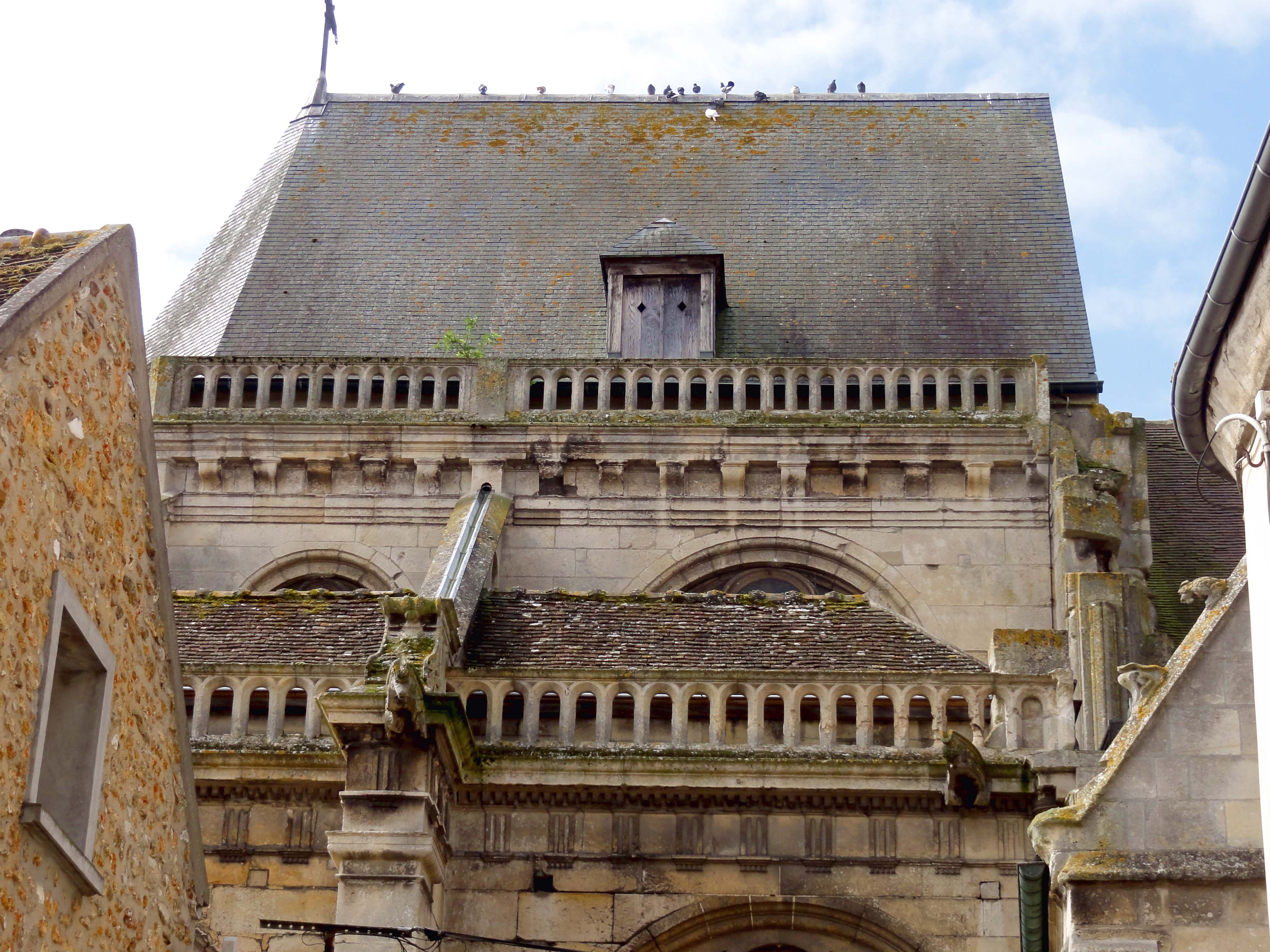 Église Saint-Martin - voir titre.